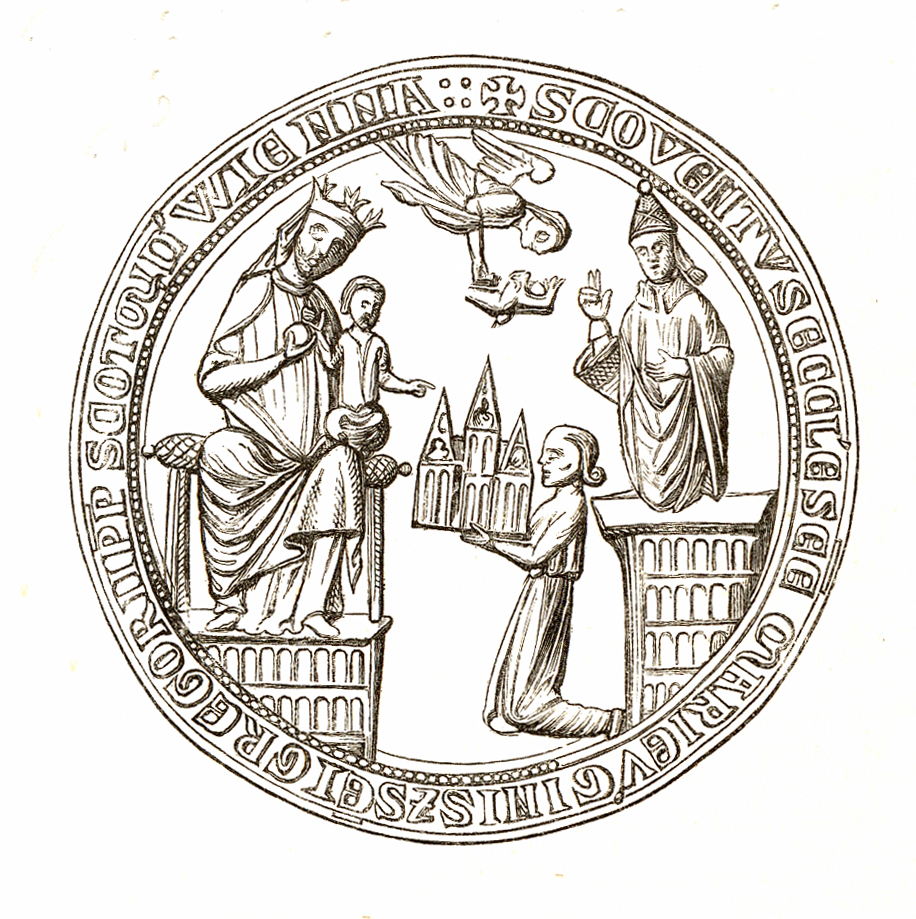 Zeichnung aus dem Jahrbuch der kaiserl. königl. Central-Commission zur Erforschung und Erhaltung der Baudenkmale III. 1859. Aufsatz von Karl von Sava, Sphragistiker, mit dem Titel: Die mittelalterlichen Siegel der Abteien und Regularstifte im Erzherzhogtum Österreich ob und unter der Enns Zuordnung der Zeichnungen entsprechend den Dateinamen